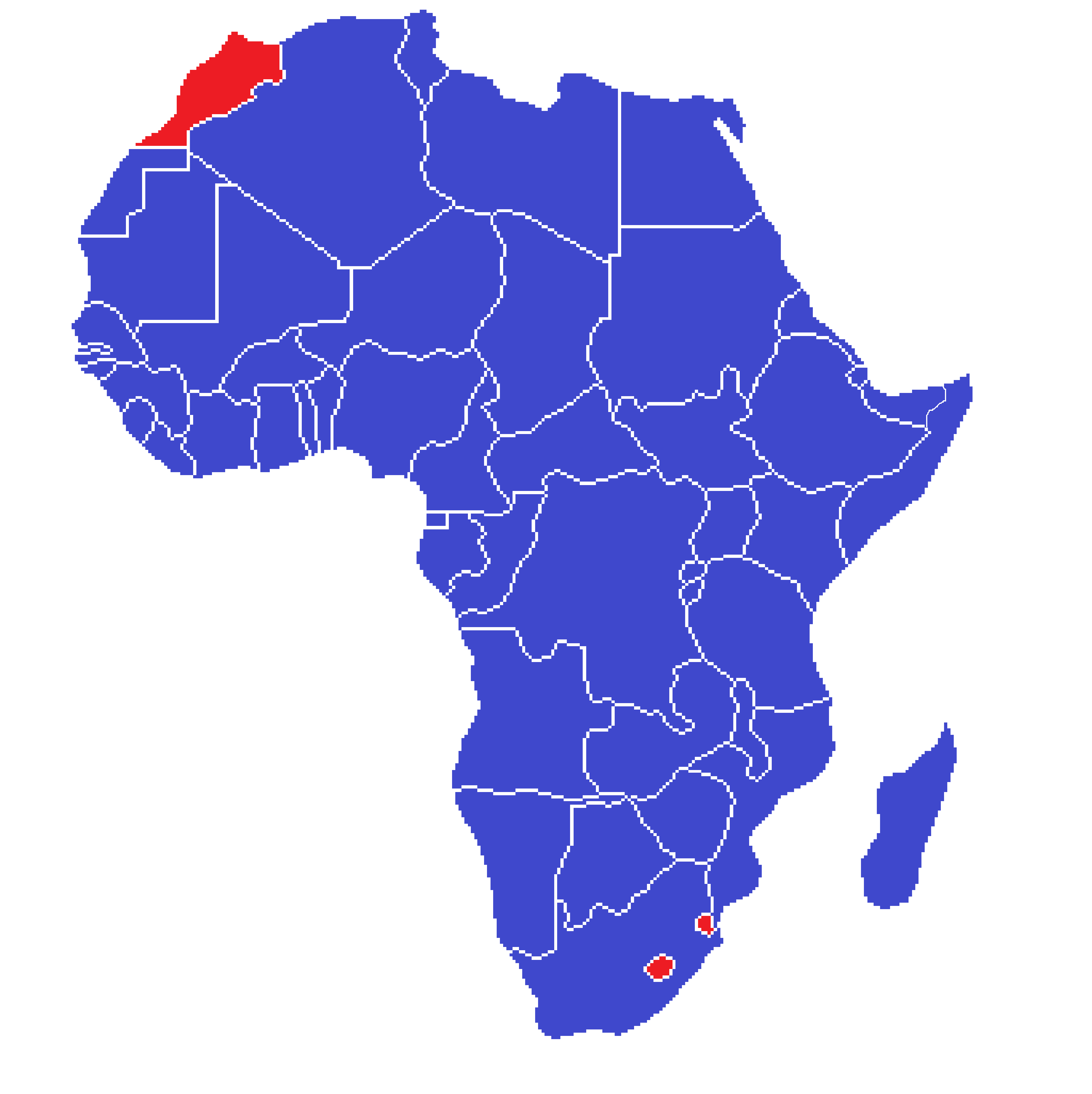 Forma de gobiernos de África continental entre monarquía (rojo) y república (azul).